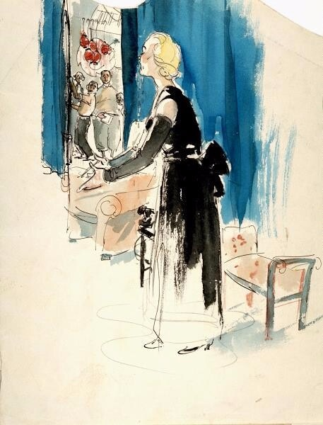 De actrice Camilla Spira ten voeten uit staande naar links, huilend met de armen voor zich in een smekend gebaar, op het toneel. Links staan vier mannen tussen de coulissen te kijken. Objectnummer: MB01450 Materiaal:papier Vervaardigingsdatum: 1942 tot 1944 Afmetingen: hoogte: 24.5 cm, breedte: 17.4 cm Techniek: getekend, geschilderd, aquarel, oostindische inkt (meerkleurig) Collectie: Joods Historisch Museum. Verzameling Leo Kok, bruikleen van dhr. en mw. Nijstad-de Wijze